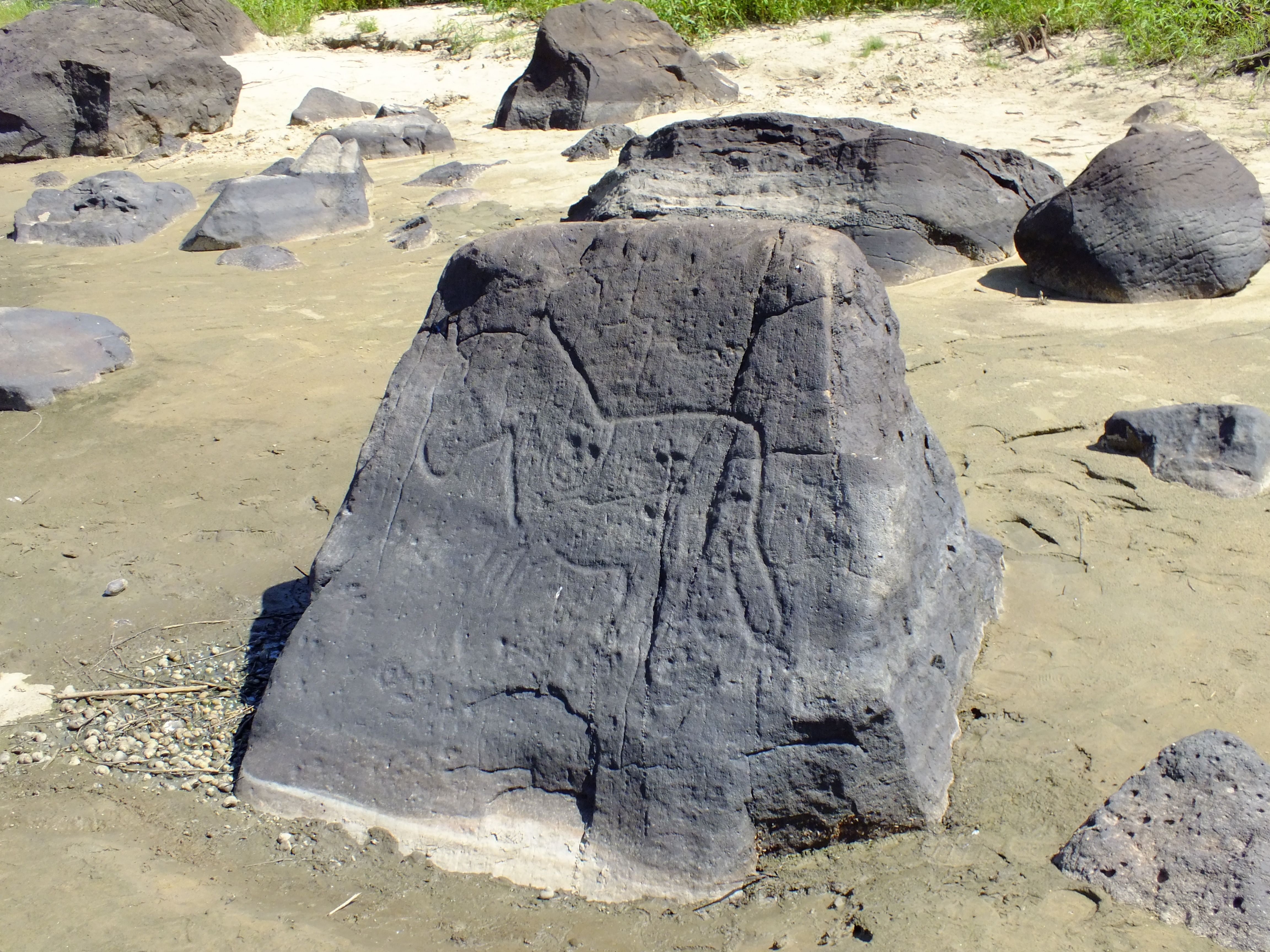 Petroglif of Sikachi-Alyan